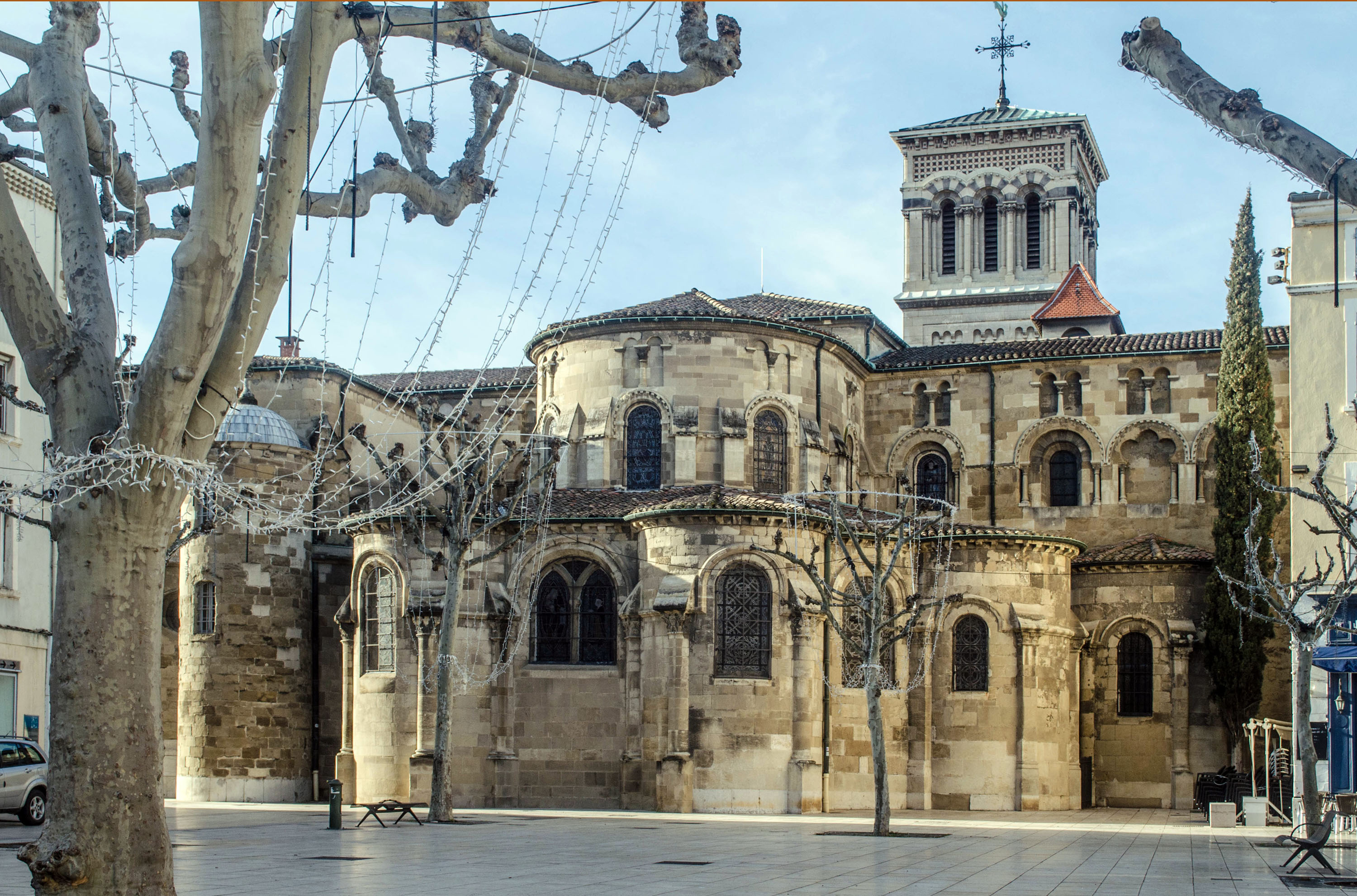 Cathédrale Saint-Apollinaire, Valence, Drôme, France : chevet, vu de la place des clercs.